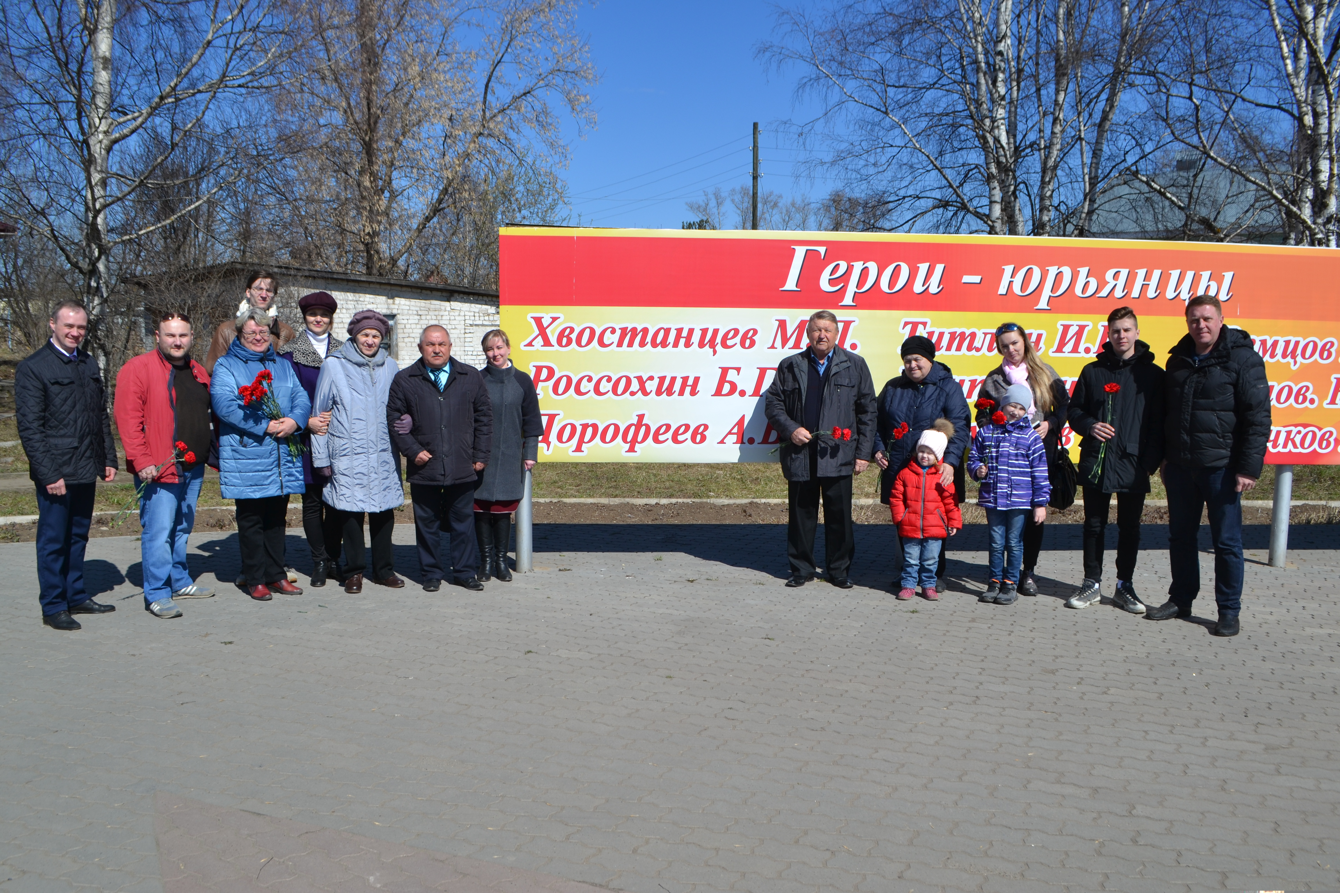 Герои - Юрьянцы. У памятного знака. Юрья 2019 г.